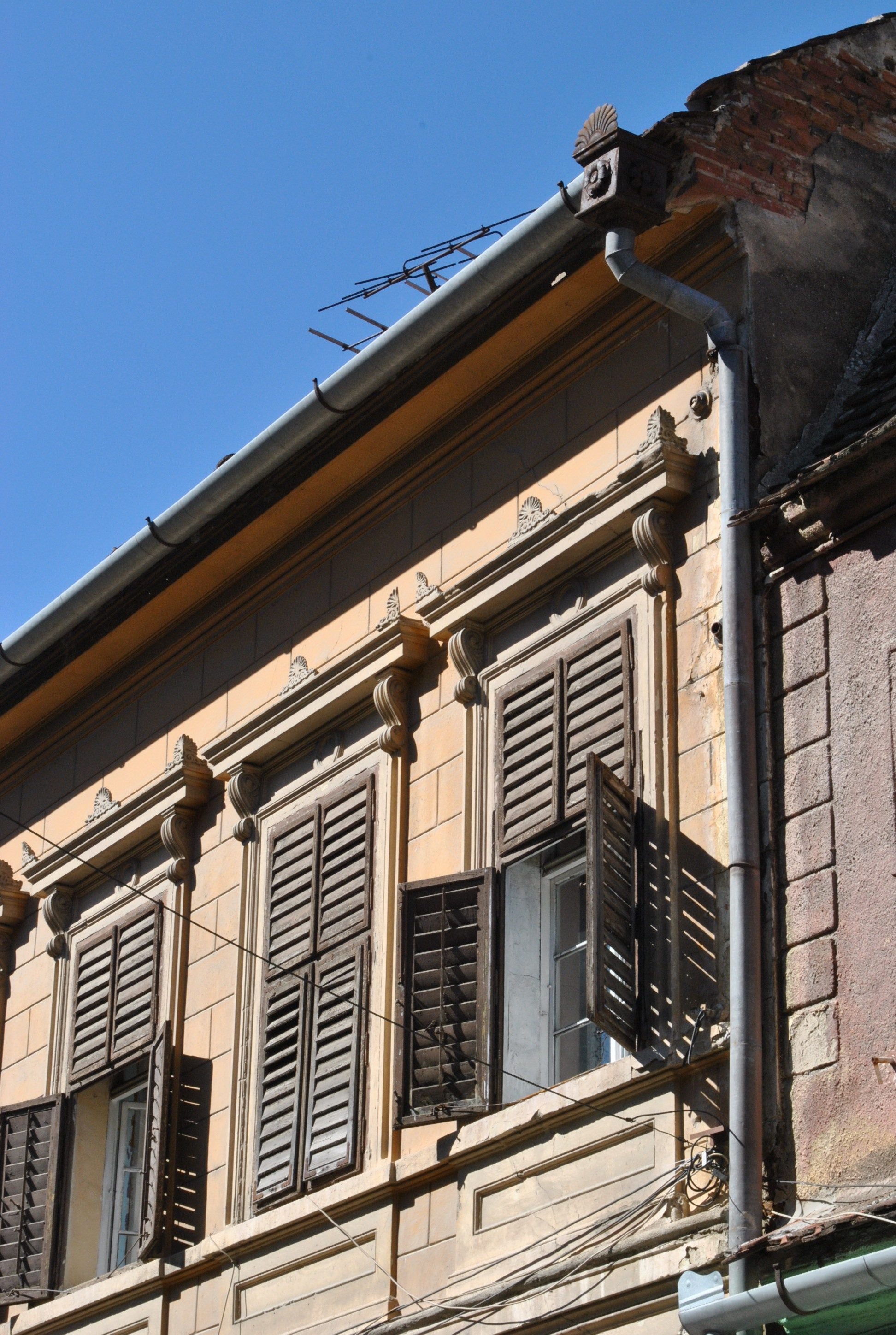 Casa Hermann Wagner, sec. XVI,1850-1875